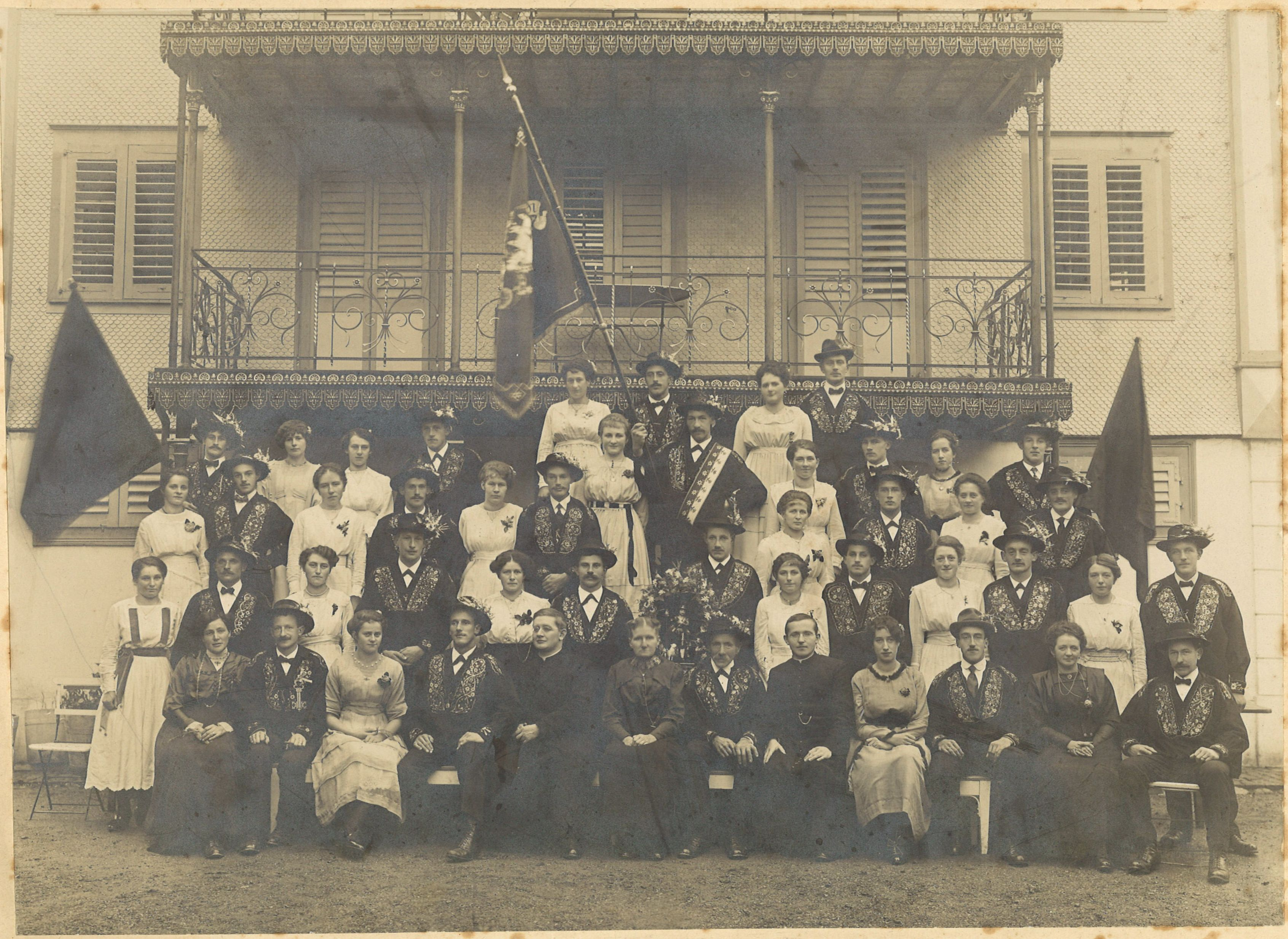 Älperchilbi Beckenried 9. und 10. Nov. 1919. Staatsarchiv Nidwalden OC 2/54.